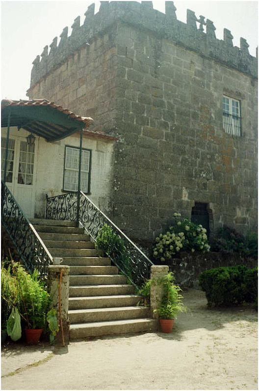 Fotografia tirada do Solar em Penafiel, Portugal em 15/01/2009